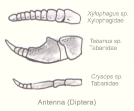 Diptera - antenna - Tabanidae - Xylophagidae